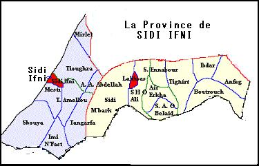 le découpage administratif de la province de Sidi Ifni